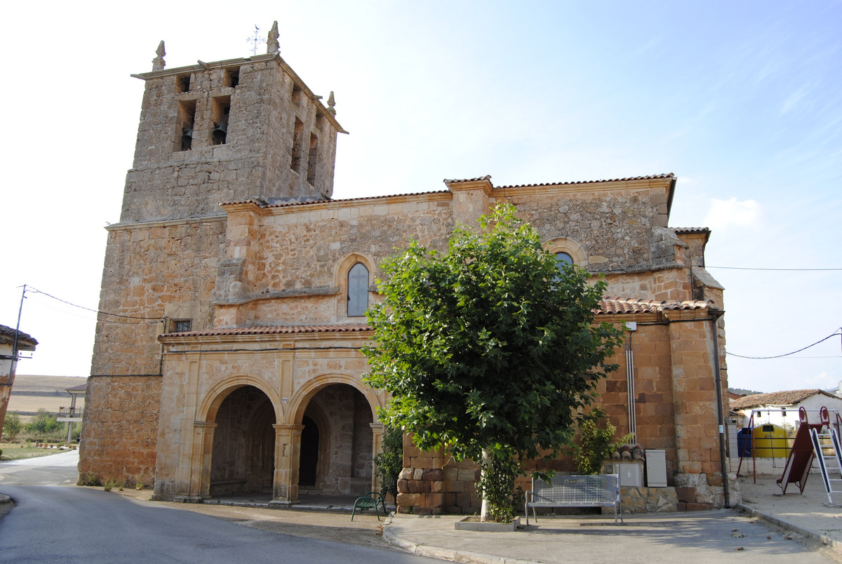 Iglesia de Santa Columba. Salazar de Amaya. España.